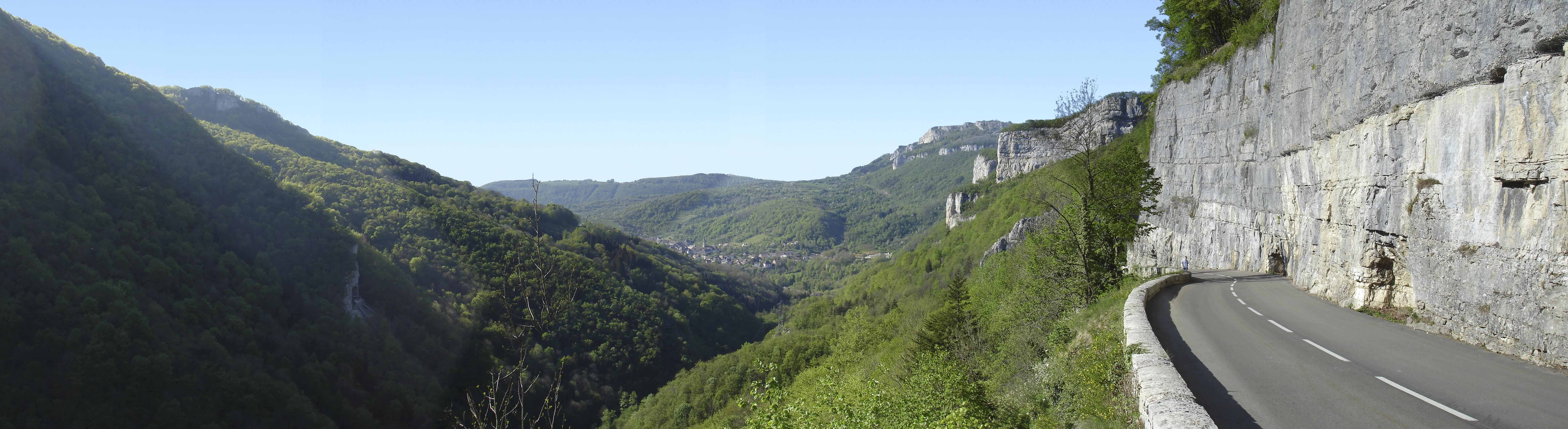 Vallée de la loue (Mouthier HautePierre). L'arbre au premier plan est étrangement coupé. Truquage ?